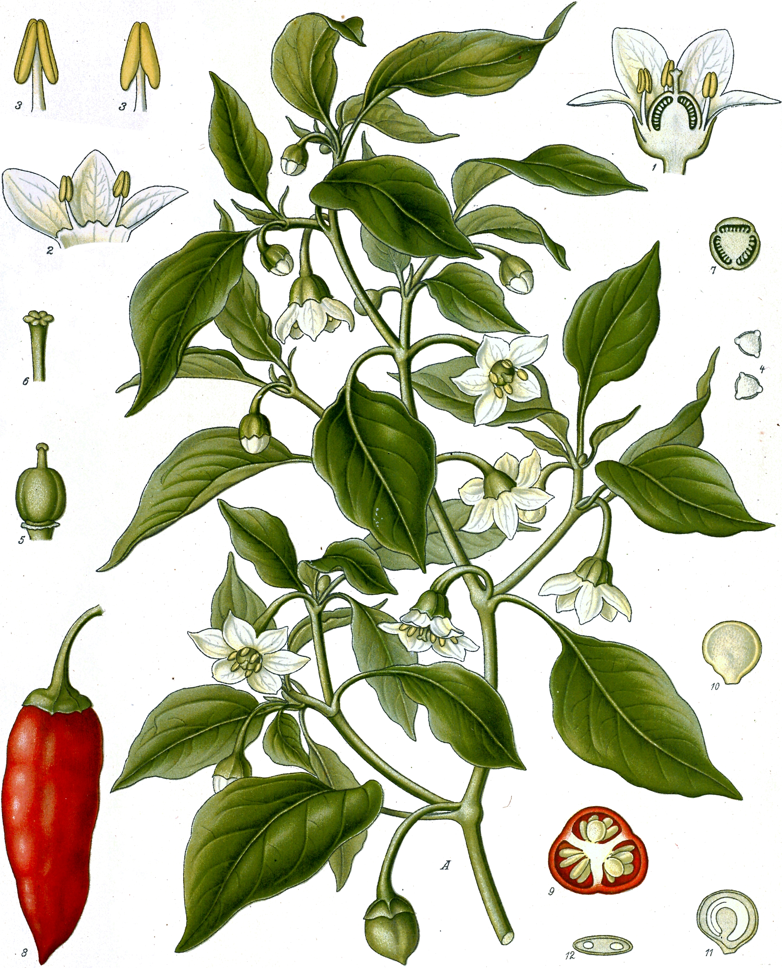 Spanischer Pfeffer. A Theil der blühenden Pflanze, natürl. Grösse; 1 Blüthe im Längsschnitt, vergrössert; 2 aufgeschnittene Krone mit Staubgefässen, desgl.; 3 Staubgefäss, desgl.; 4 Pollen, desgl.; 5 Stempel, desgl.; 6 Griffel und Narbe, desgl.; 7 Fruchtknoten im Querschnitt, desgl.; 8 Frucht, nat. Grösse; 9 dieselbe im Querschnitt, desgl.; 10 Same, vergrössert; 11 u. 12 derselbe im Längs- und Querschnit.